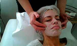 exfoliación